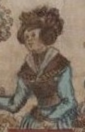 Konstancie Babenberská